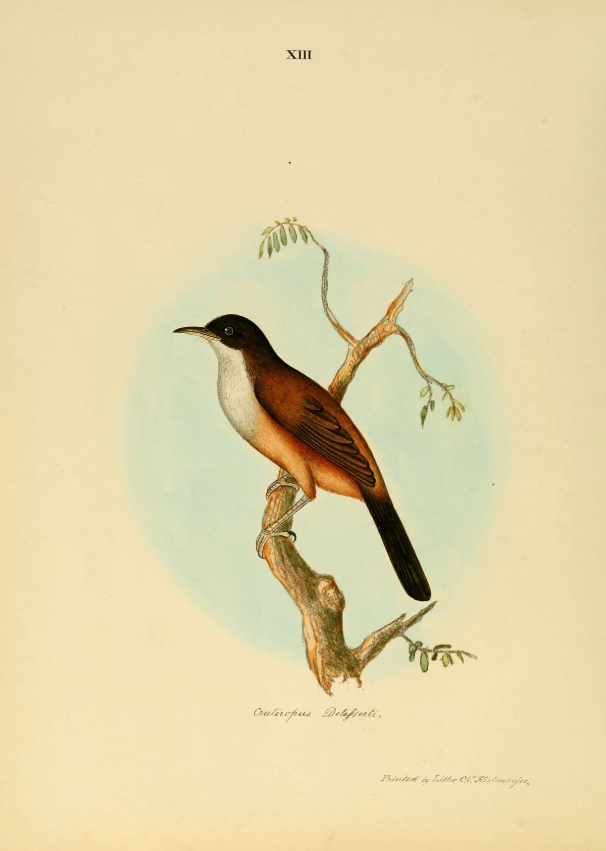 XIU Cf^/et^e/^-u^ ^e^^^et./c J J^4ifryf,/^ Jy^/'jyrjo d.V,V?K/ /.;««?, VVV